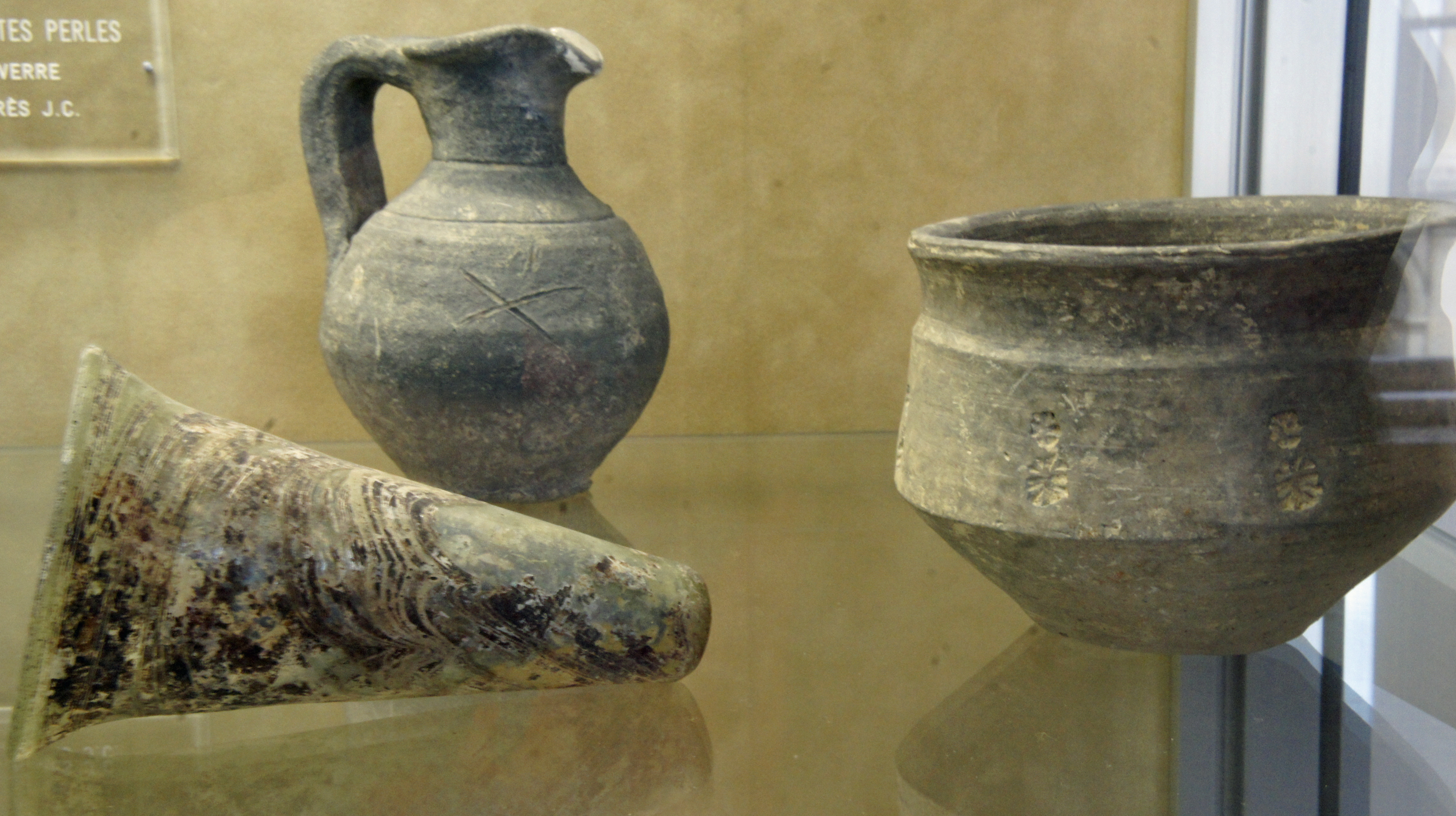 Fouille à Fléville, du VIe siècle poterie et verrerie actuellement en la Salle archéologie du Musée Saint-Remi .